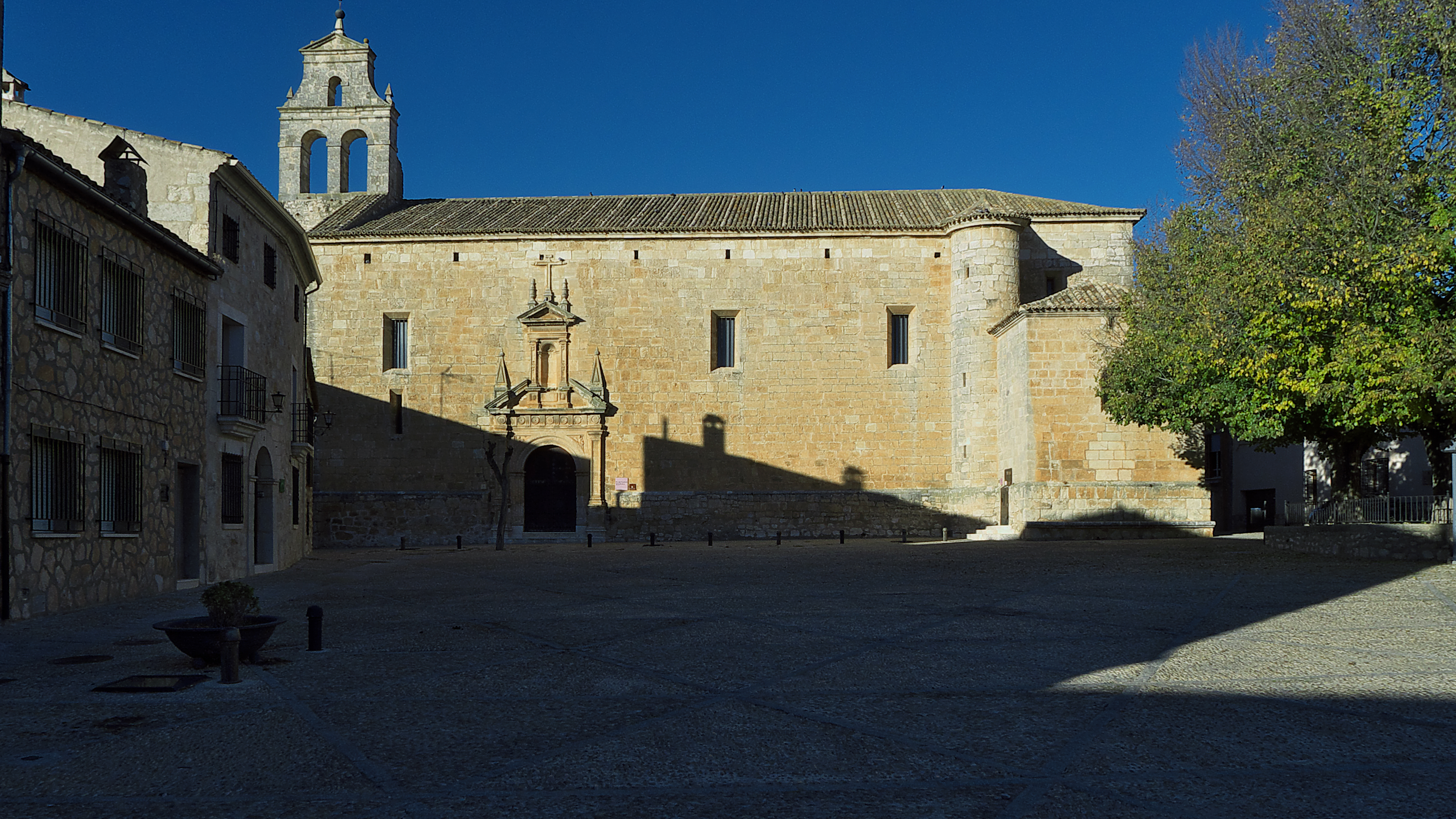 Fachada meridional